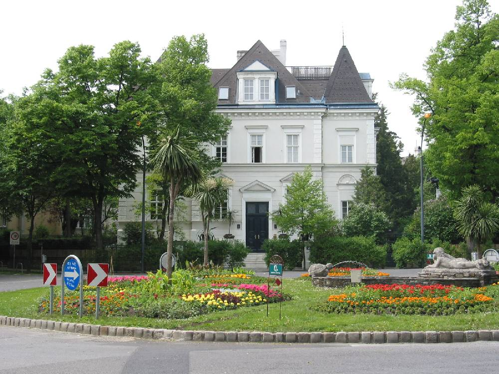 Richard-Kralik-Platz in Wien (eigenes Foto); in der Mitte des Platzes eine Skulptur von Robert Ullmann (Original text: Foto Richard-Kralik-Platz 14.5.2005)